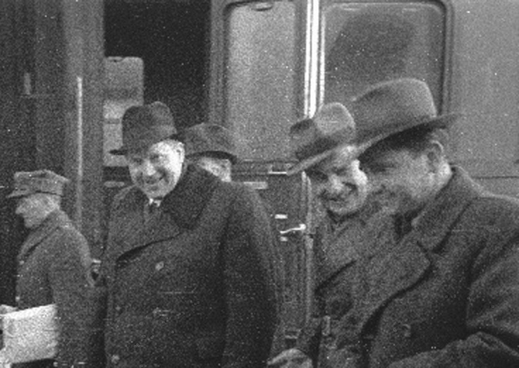 Polish MP Marek Ferdynand Arczyński and deputy PM Antoni Korzycki, March 19, 1948